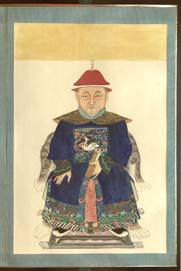 木德，丽江土通判。